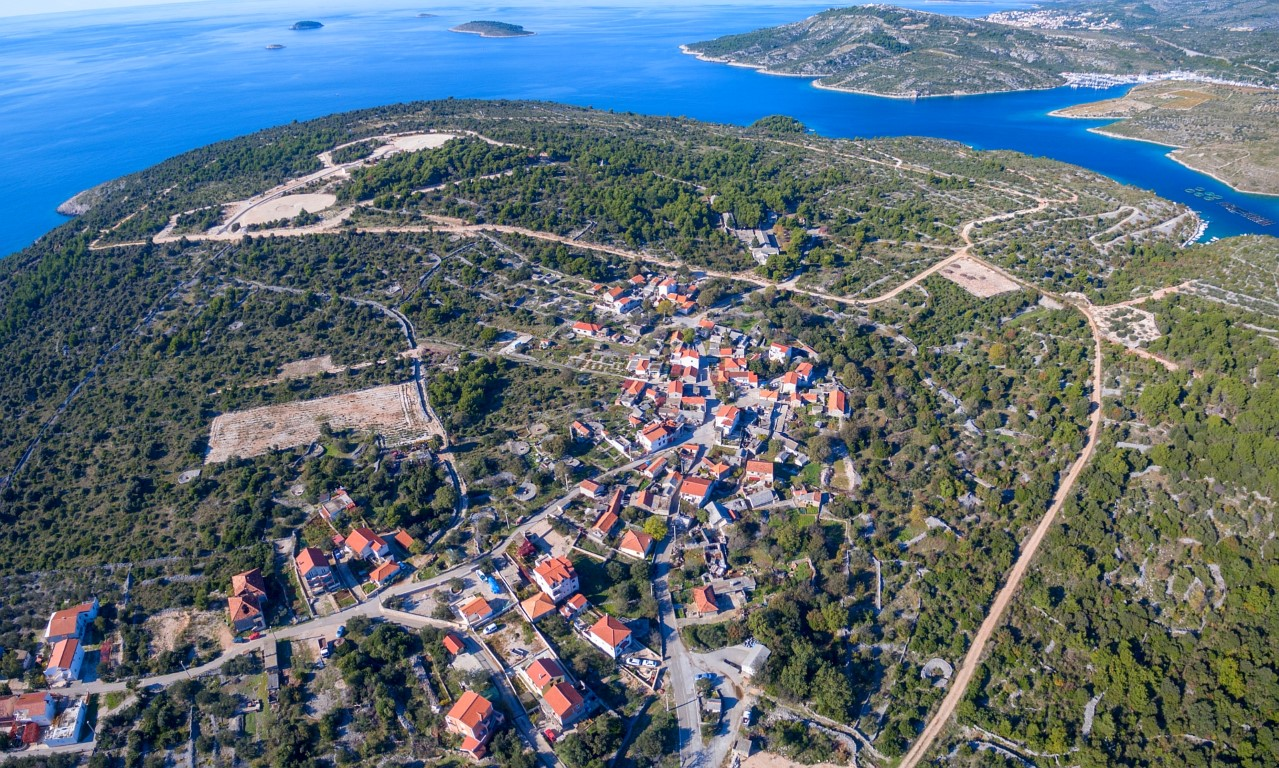 ZEČEVO ROGOZNIČKO-naselje